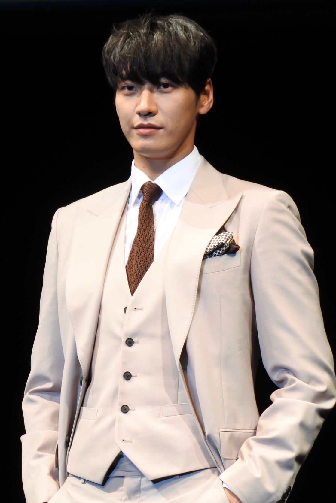 2017.10.22 プレミアムファンミーティングin品川にて